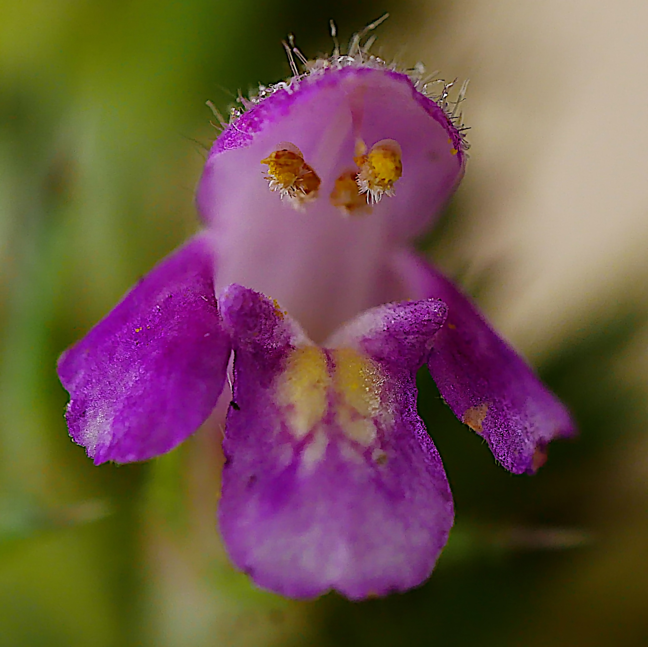 Gemeiner Hohlzahn/Stechender Hohlzahn (Galeopsis tetrahit) im Freilichtmuseum Roscheider Hof. Standort (2020) Hinter der Waldbühne auf der durch Baumfällungen entstandenen Brachfläche.